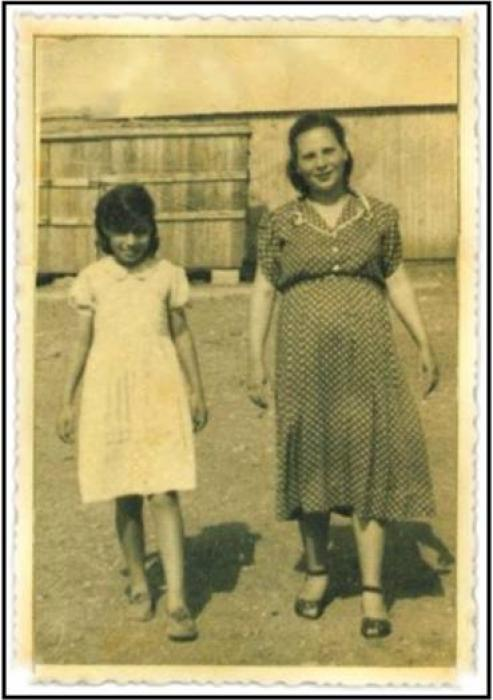 אני העוברית, אימי מעוברת במעברה השנה 1952 מעברת כפר חסידים, בה נישאו הורי שעלו מצפון אפריקה